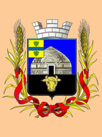 Қазақша (кирил): Перовск қаласының таңбасы